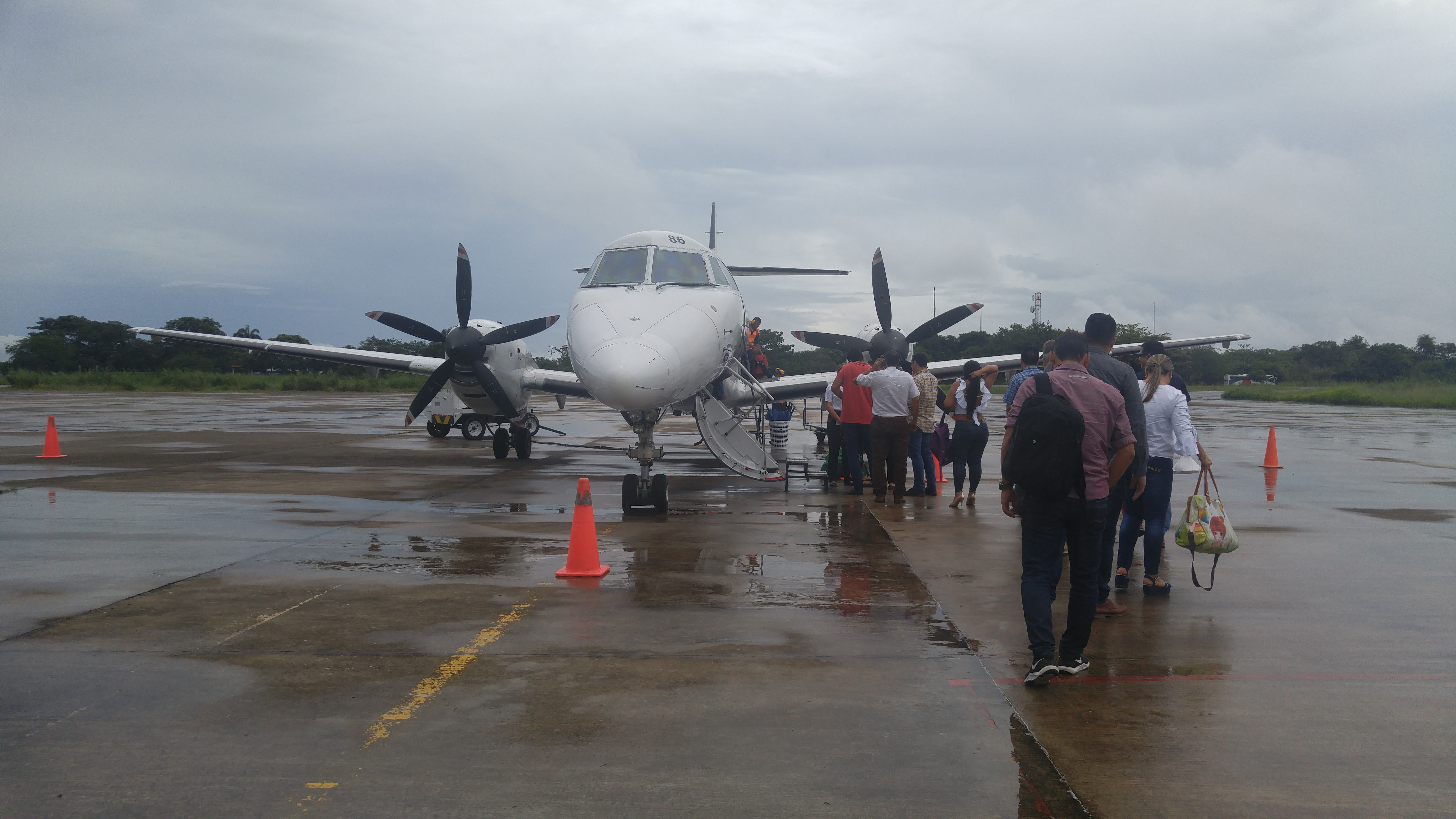 Abordaje en una avioneta de EasyFly Colombia